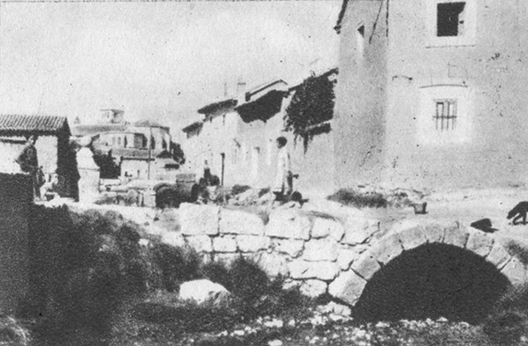 Vista parcial de una calle - Fuentes de Valdepero (Palencia) - España Turística y Monumental / Cuarto álbum / Las Bellezas de Castilla / Región Leonesa - Cromo 70 x 50 Sepia